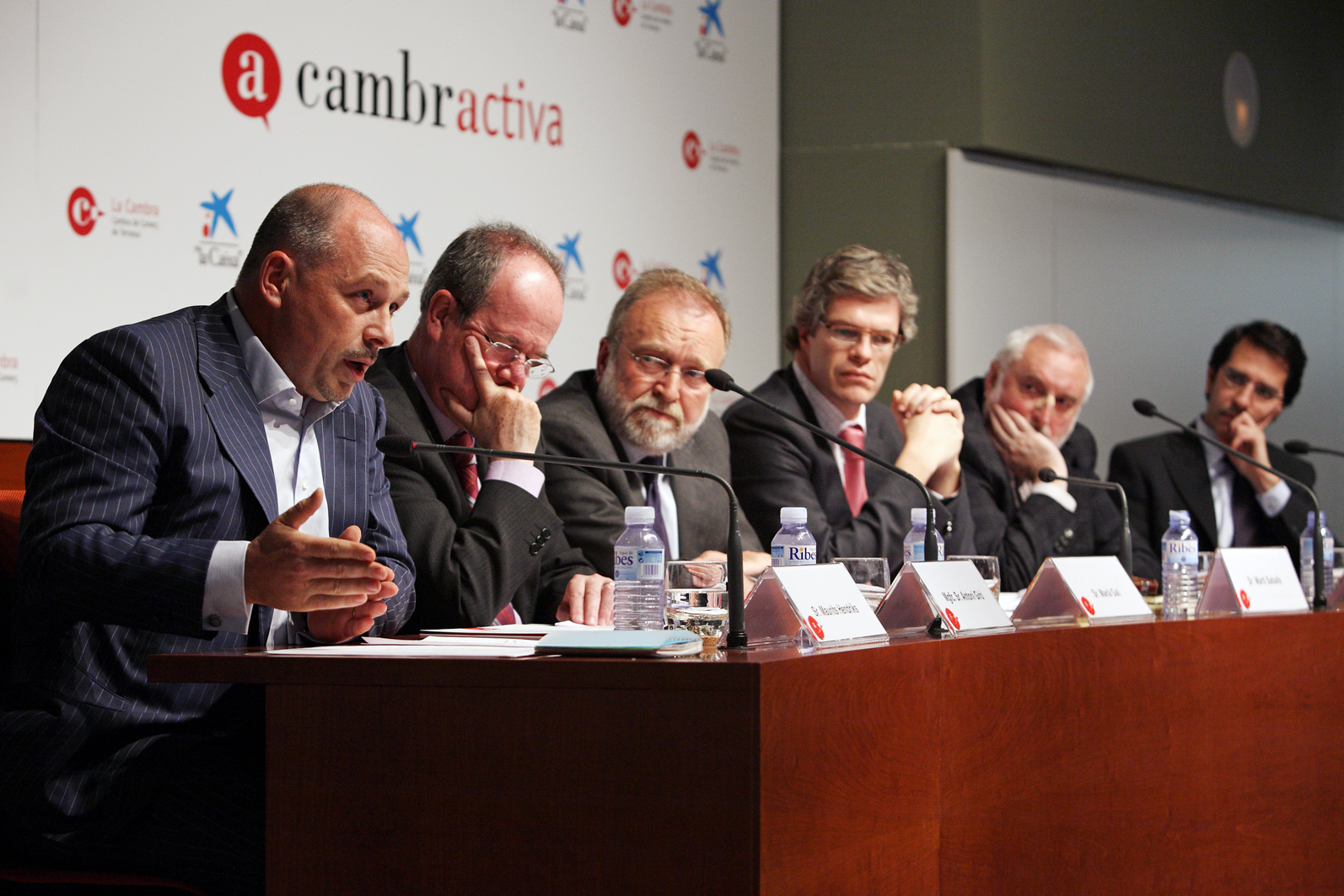 Imagen de una reunión informativa "Cambractiva"